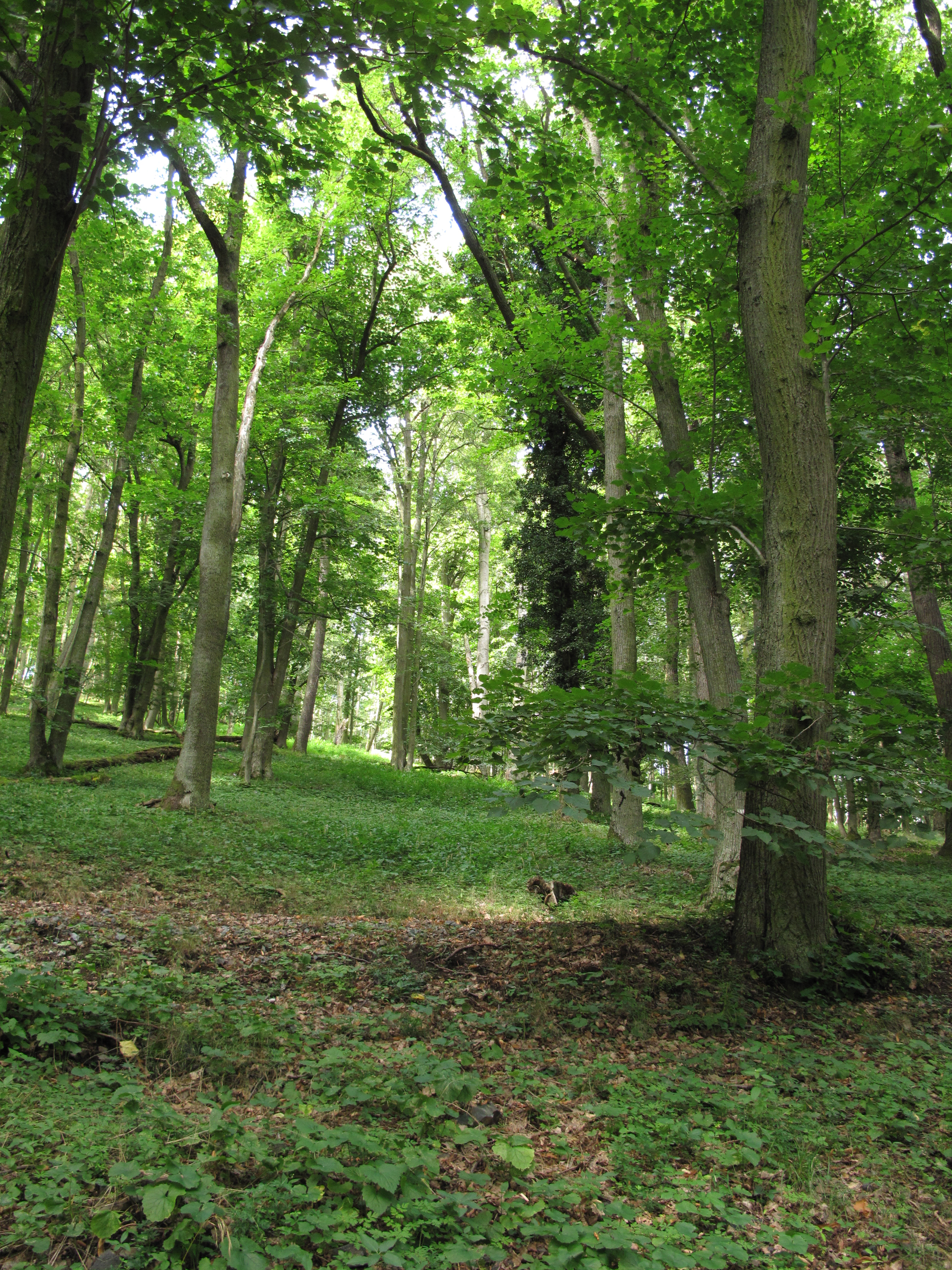 Přírodní rezervace Bělyšov, okres Klatovy, Česká republika.